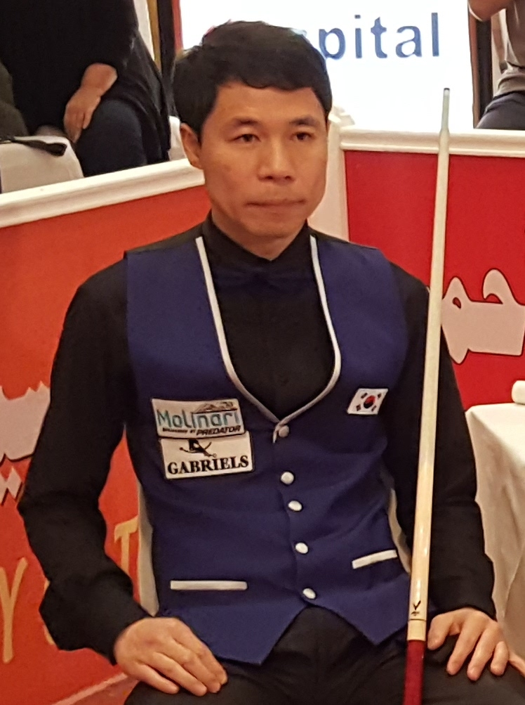 2016 3-Cushion World Cup-Final player Heo Jung-han